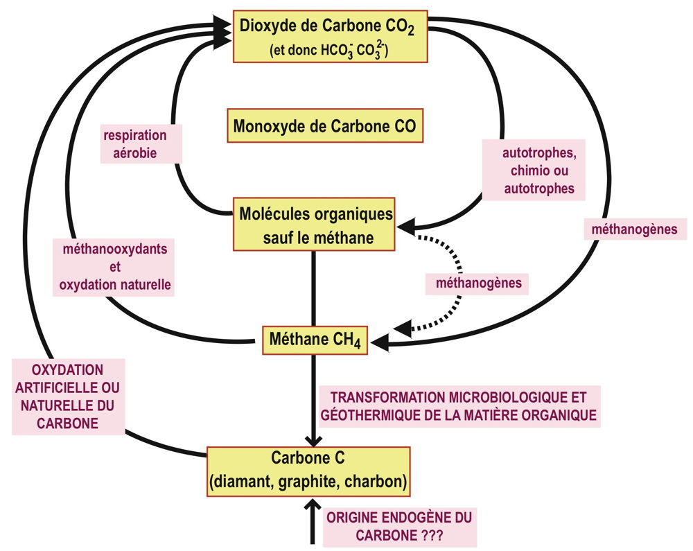 biologie et cycle du carbone